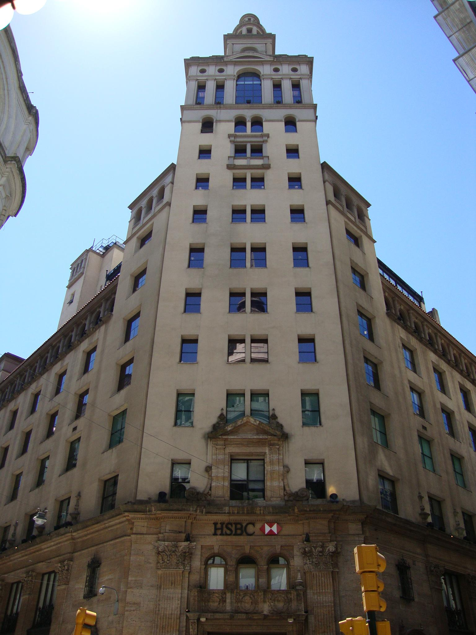 Torre del edificio construido para el Banco Popular Argentino, sede de su casa matriz. Actualmente sucursal del HSBC. Calle Florida, esquina Tte. Gral. Juan D. Perón.